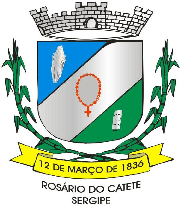 brasão município Rosário do Catete; Sergipe